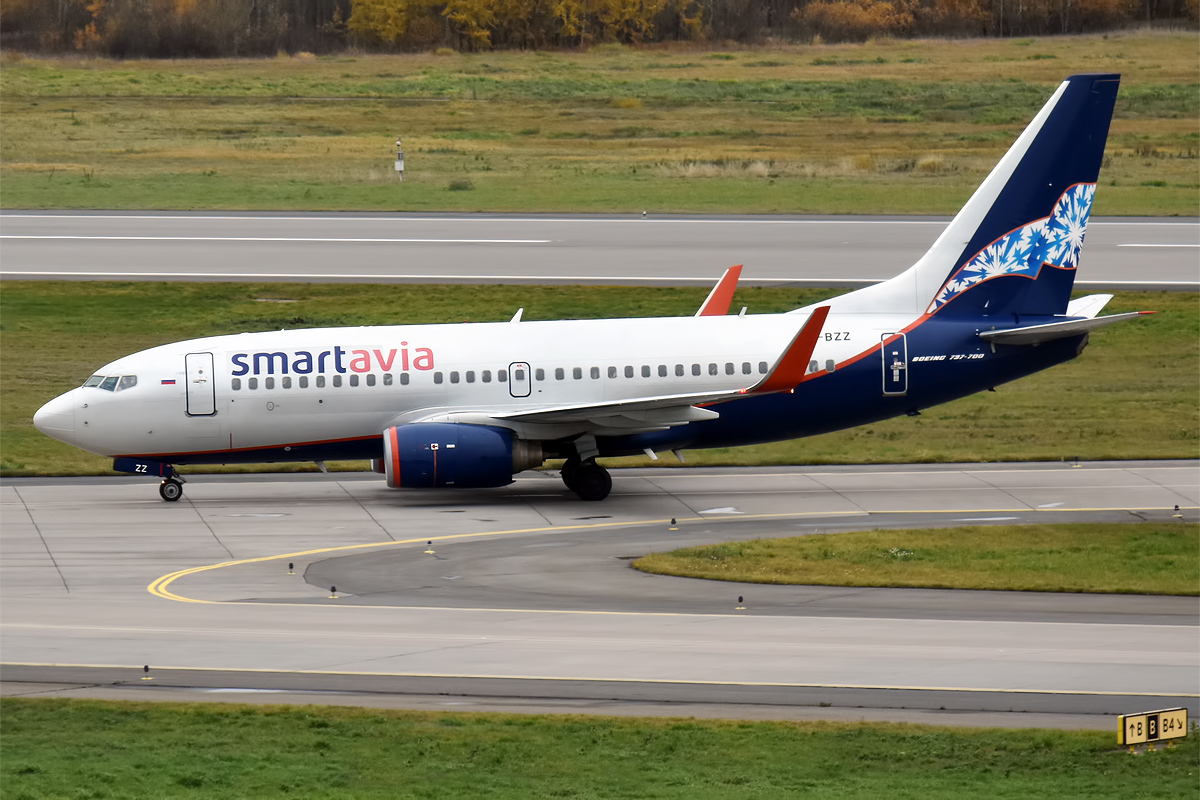 Smartavia, VP-BZZ, Boeing 737-752